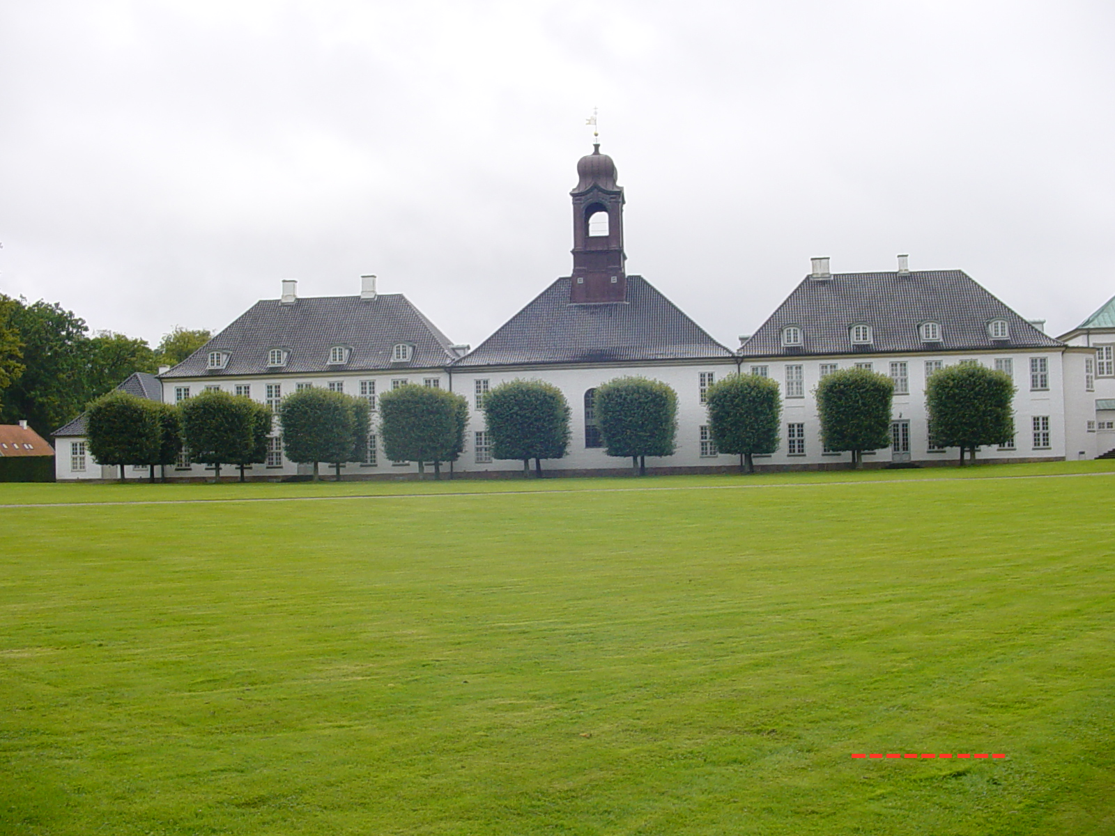 DENEMARK FREDENSBORG